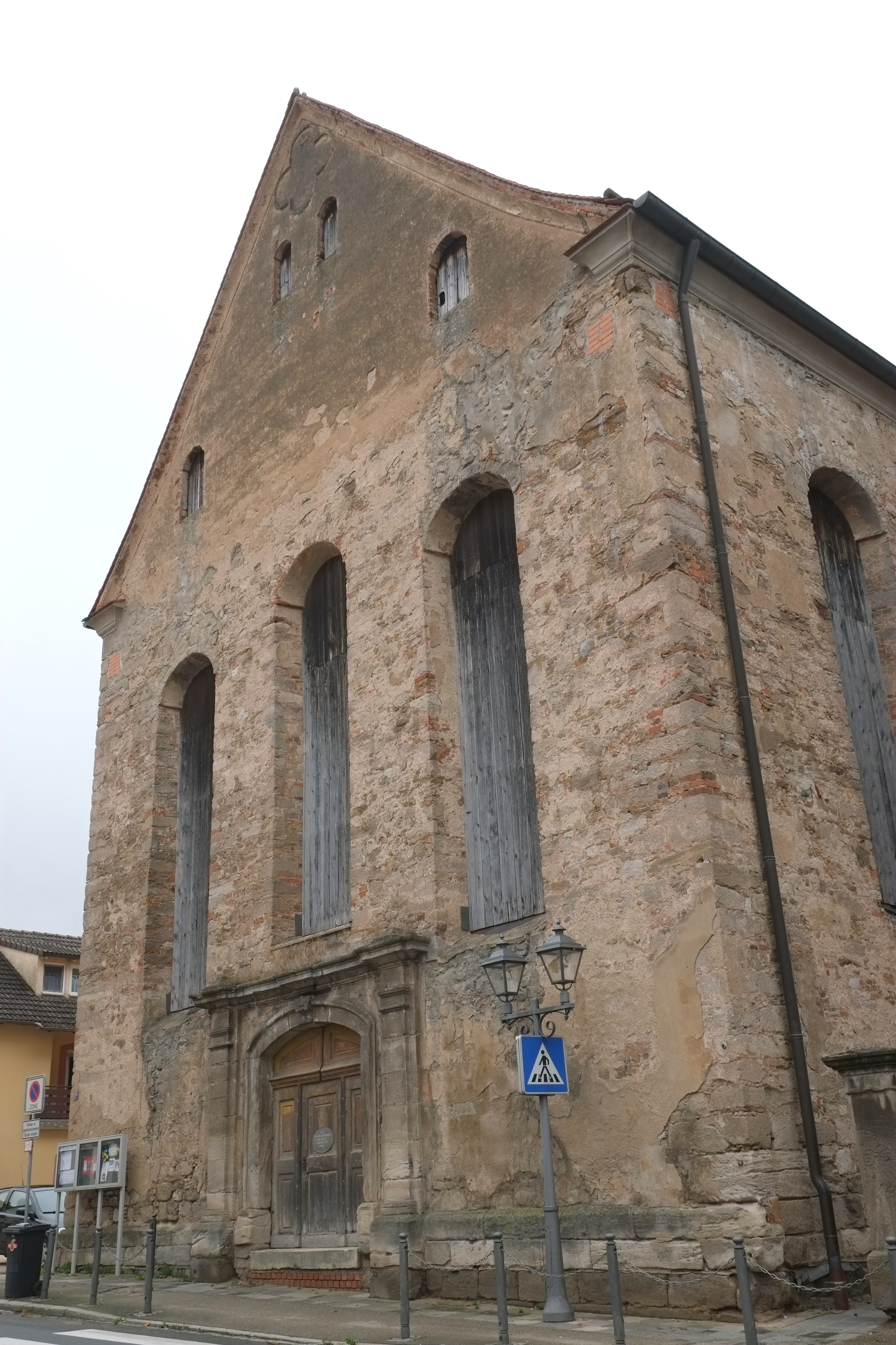 Franziskanerkirche (Hausner Gasse 7) in Ellingen im Landkreis Weißenburg-Gunzenhausen (Bayern)